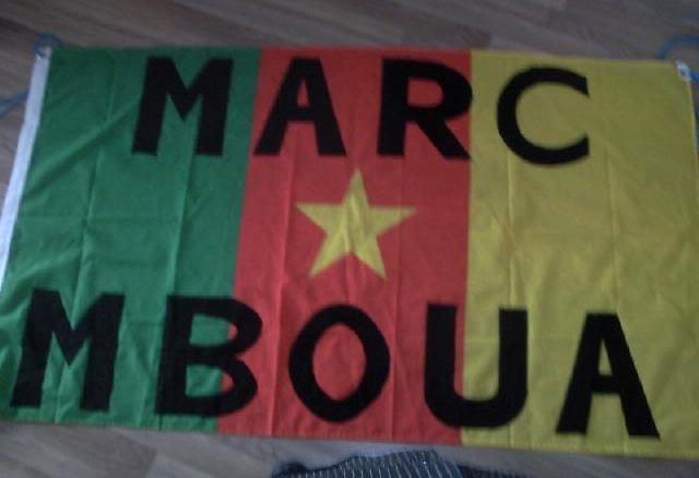 De foto van het spandoek is genomen bij mij thuis in Leeuwarden. Afgelopen vrijdag (5 dember 2008) heb ik het doek nog opgehangen bij Excelsior - SC Cambuur, waarbij RTL het spandoek nog enkele seconden in beeld heeft gebracht.